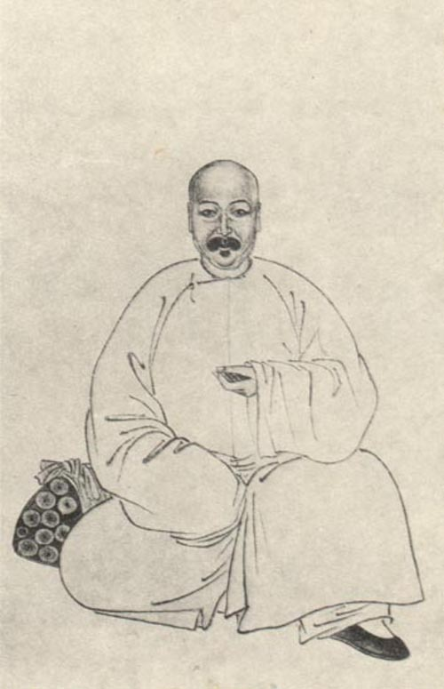 清代学者。Liu Shouzeng